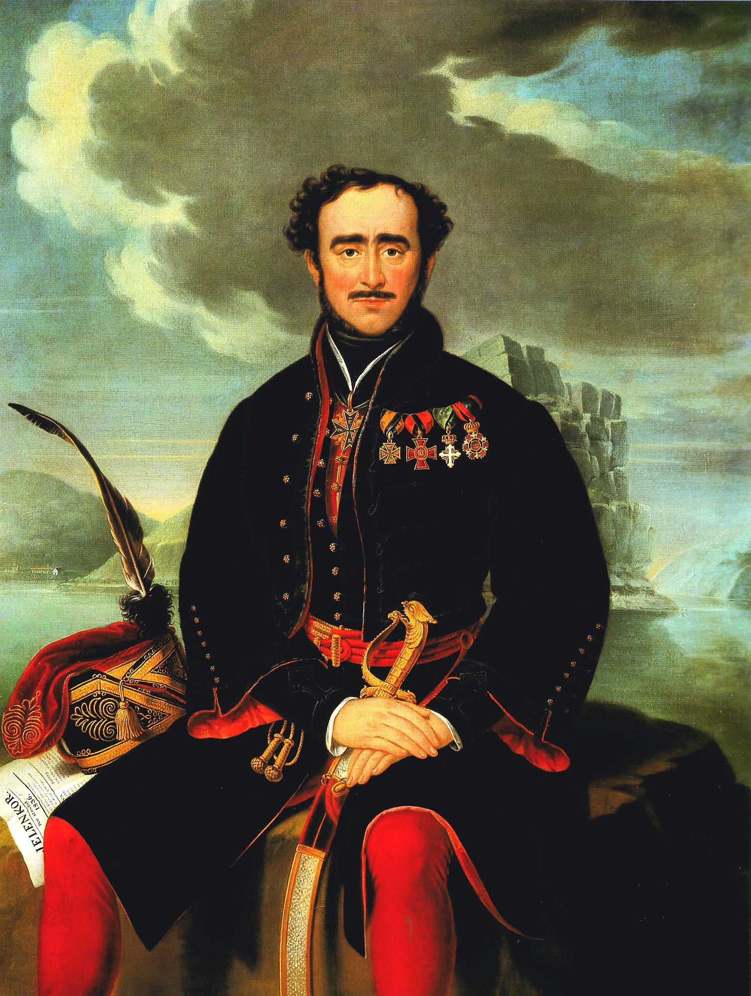 Schöfft József: Széchenyi István a Vaskapunál (Schöfft Ágoston képéről készült másolat), István Széchenyi near Iron Gate (Danube)